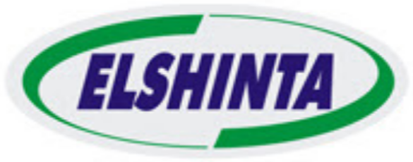 Logo Elshinta